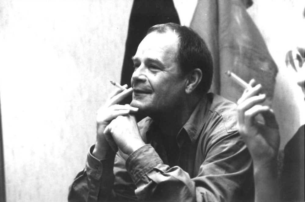 Der Schauspieler Dieter Mann im Hörspielstudio in einer Aufnahme des Berliner Fotografen Werner Bethsold.